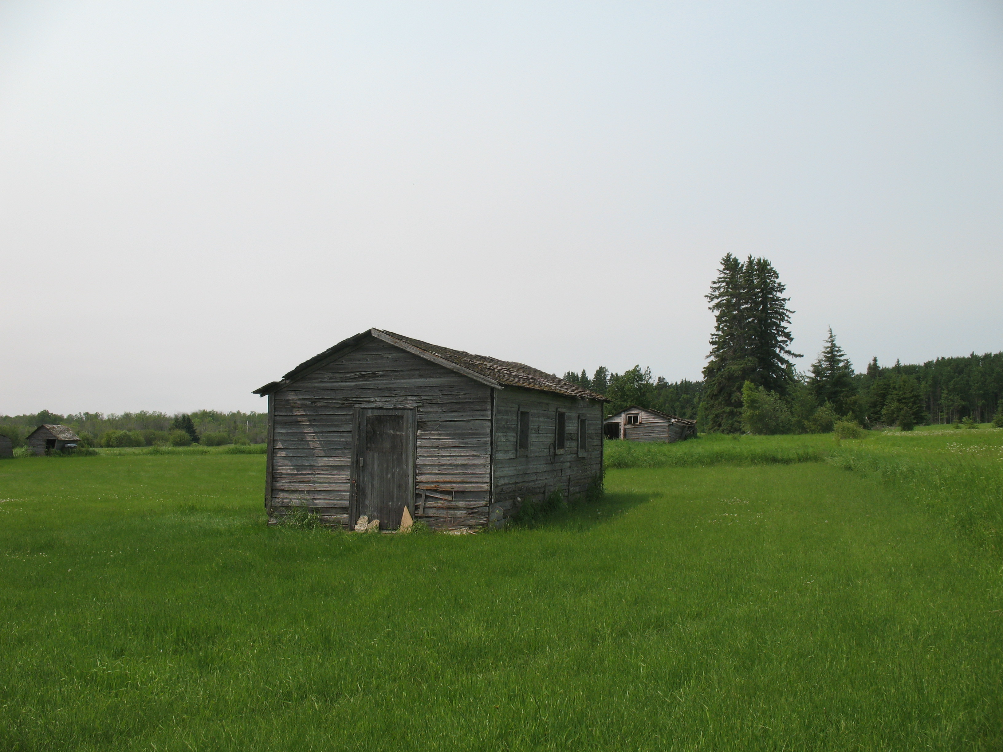 Verfallendes Haus in Hecla Village, Hecla Island in Manitoba, Kanada